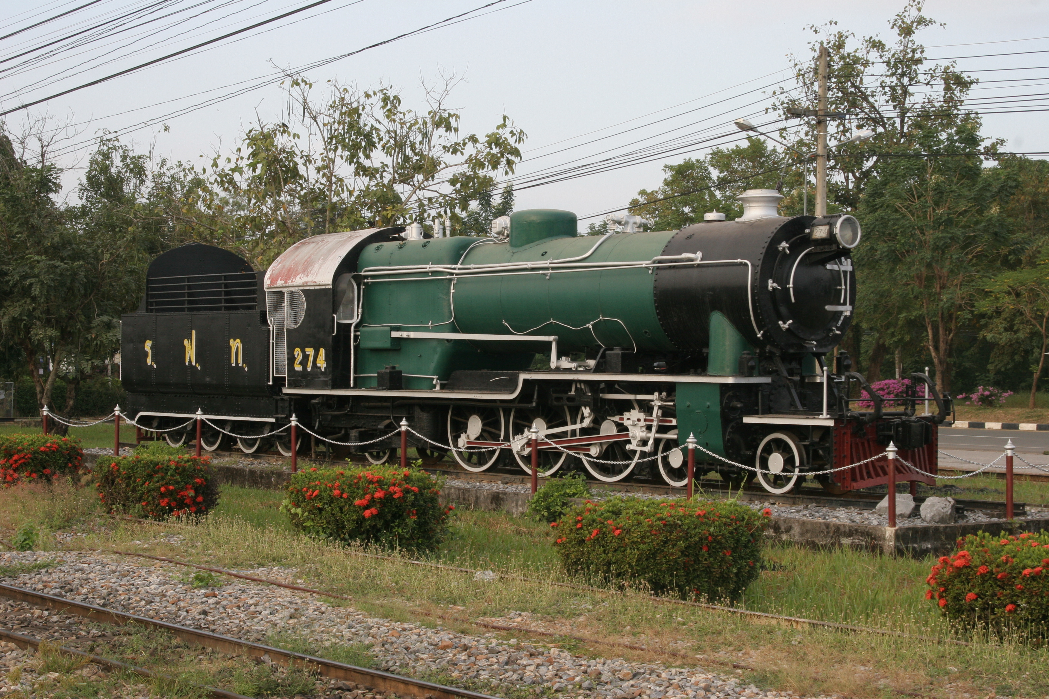 タイ国鉄蒸気機関車274号機